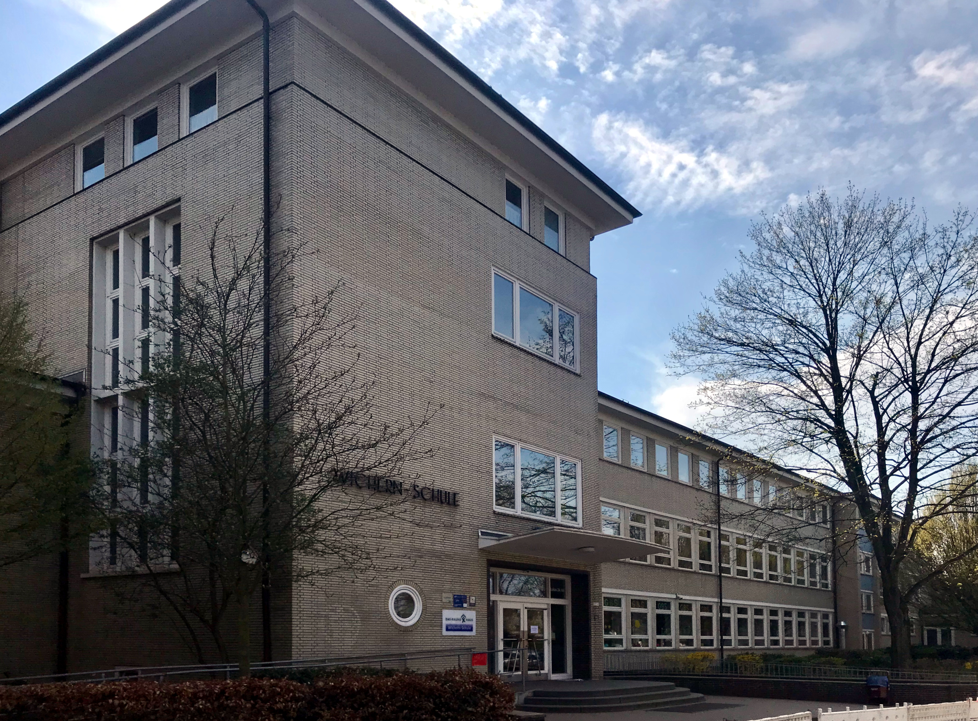 Wichern-Schule in Hamburg, vom Horner Weg aus gesehen.